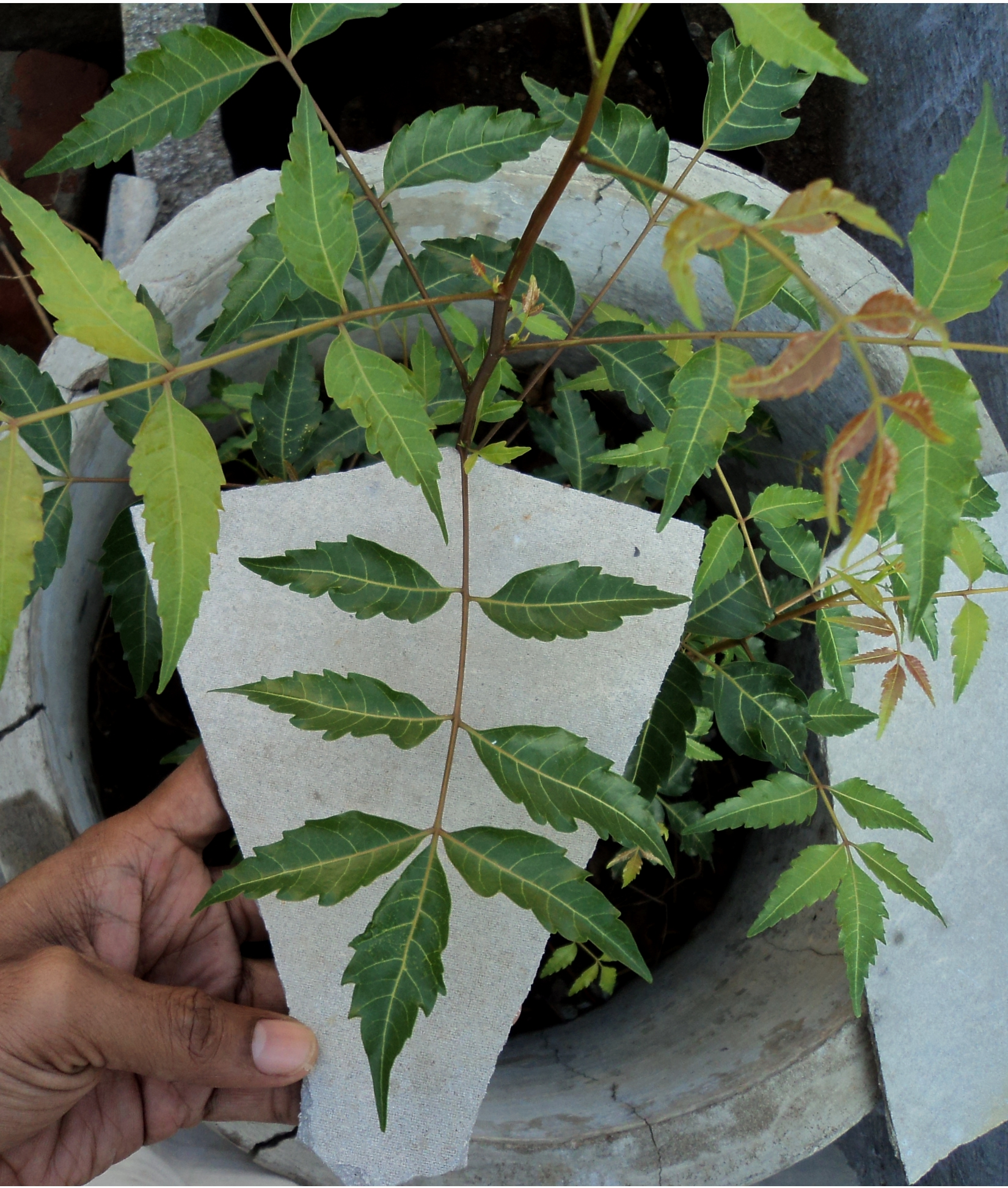 rural areas in Tamil Nadu, India.